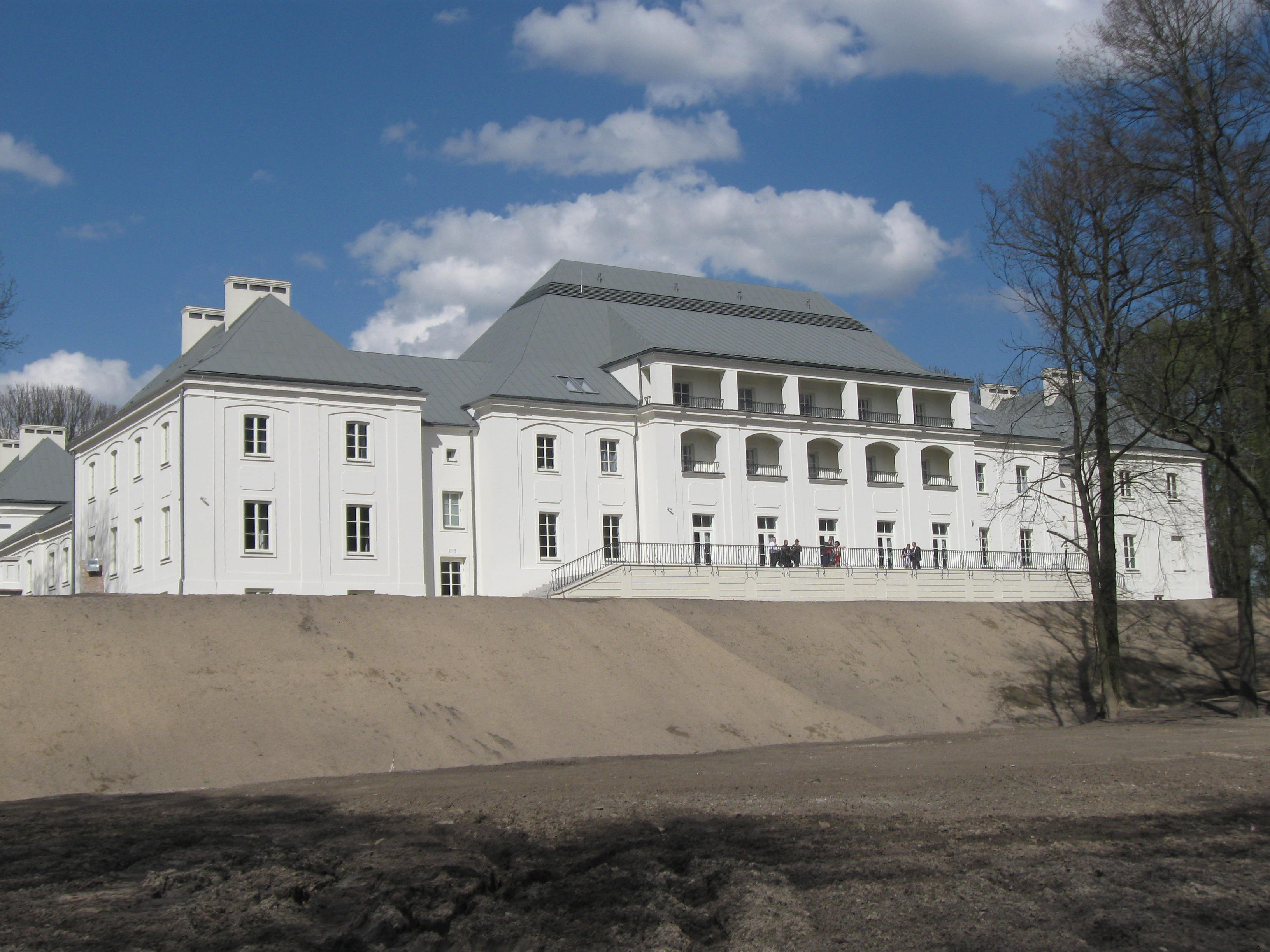 Janów Podlaski, oficyna (skrzydło)